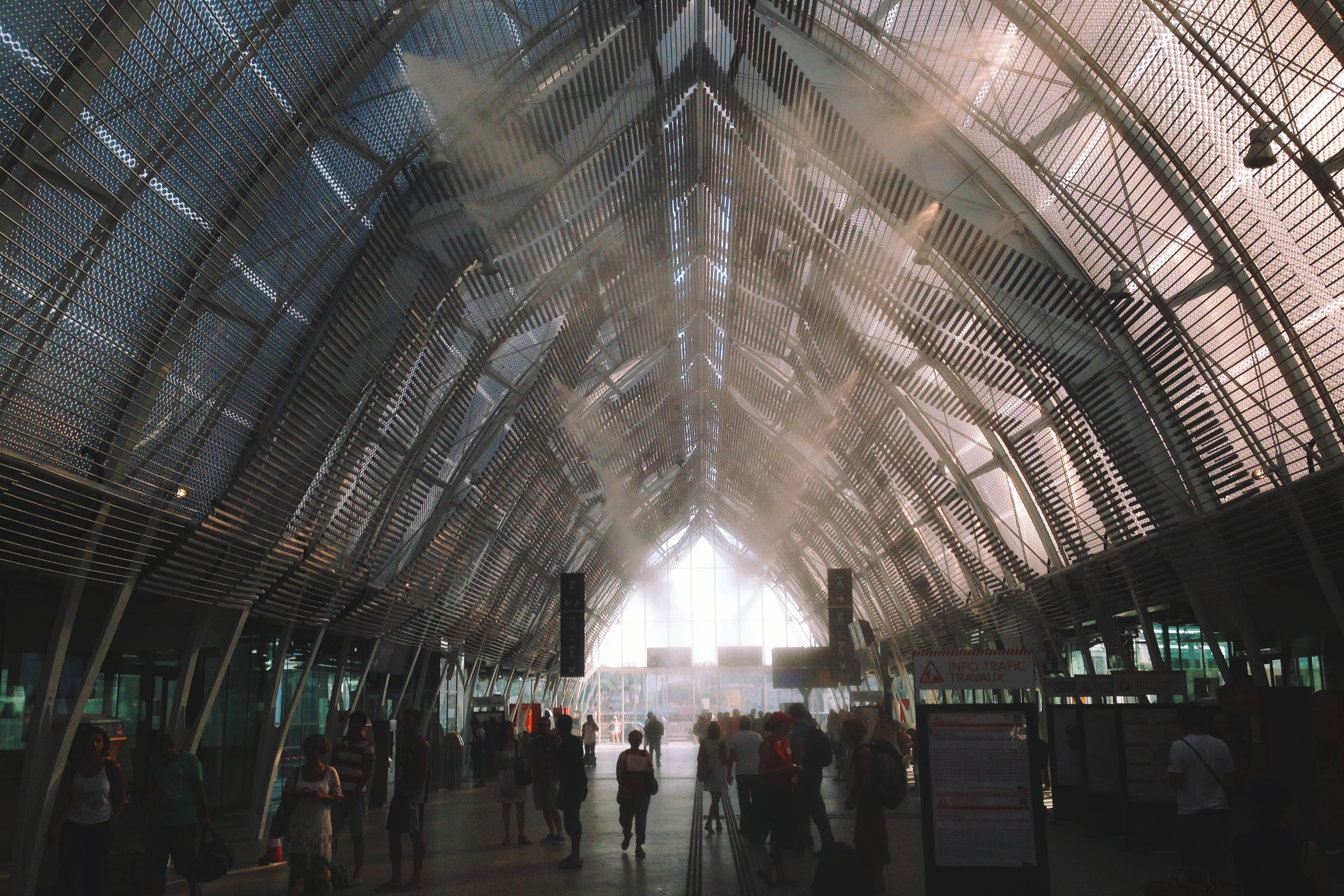 Внутри здания железнодорожного вокзала Монпелье распыляют воду. До этого я такое только в уличных кафе видел.